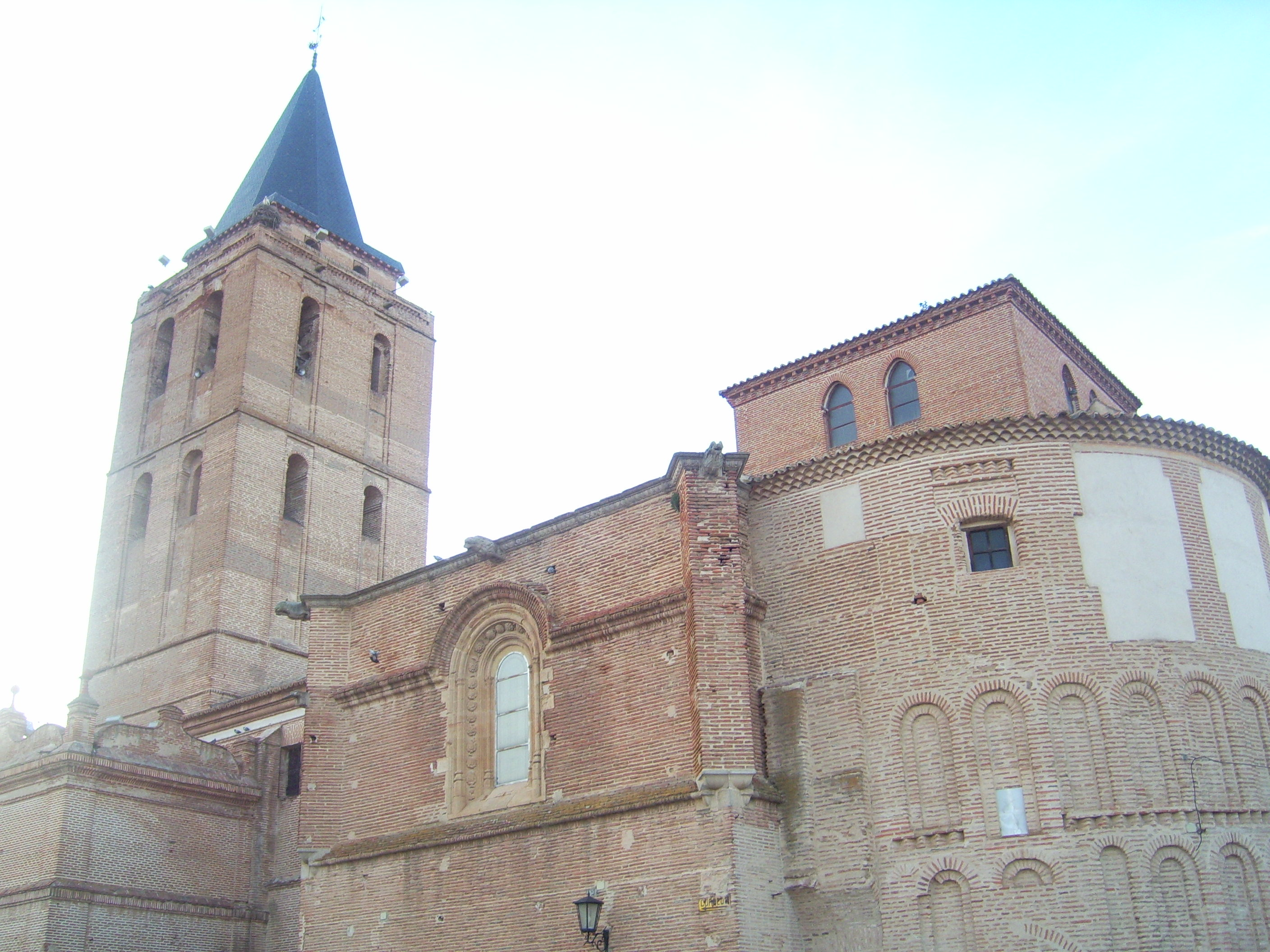 Iglesia de San Nicolas (Madrigal de las Altas Torres, Ávila)